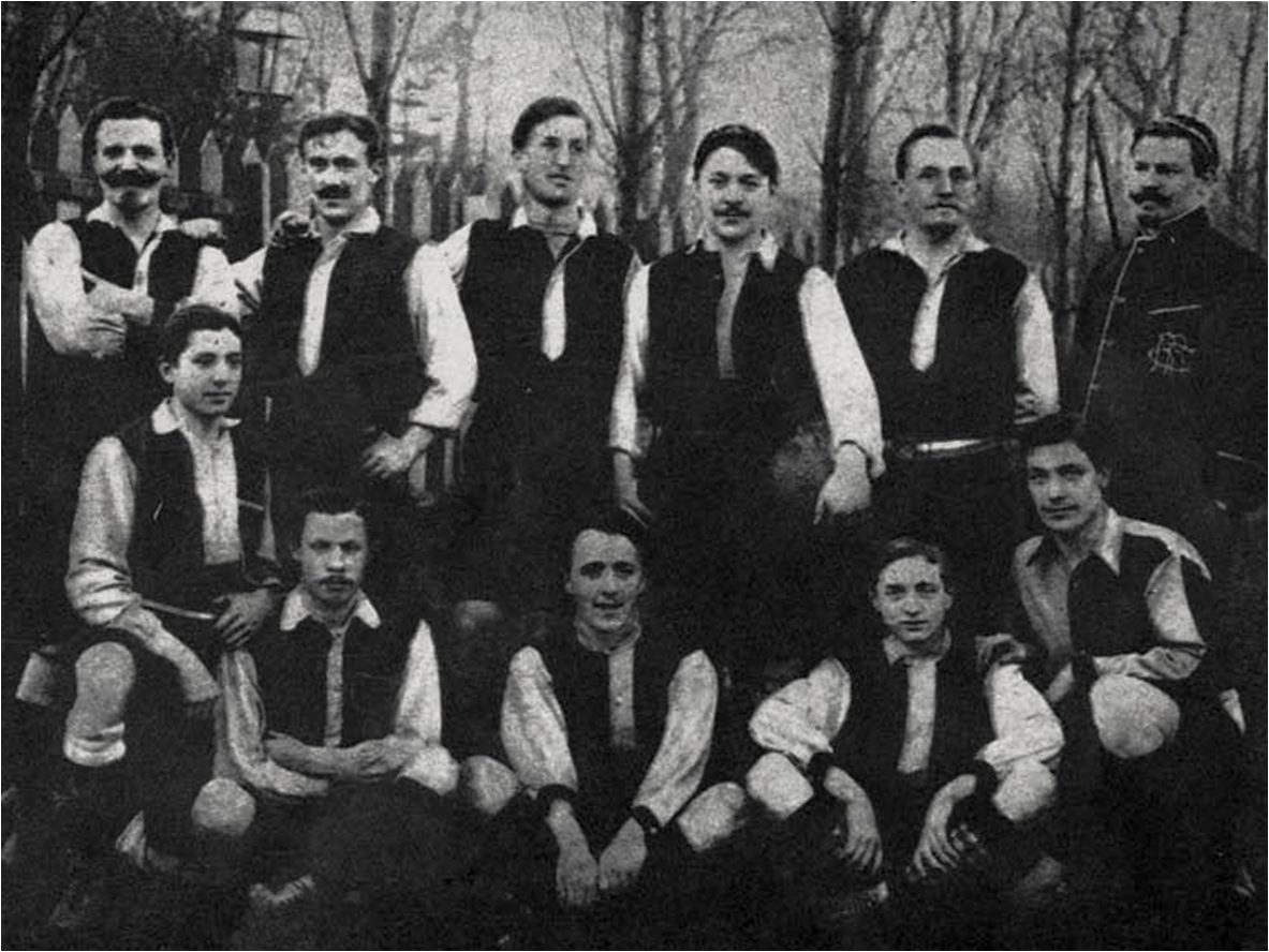 Equipe de football du RC Roubaix championne de France de l'USFSA en 1902. Debout : Ernest Lesur, Émile Mongey, Peacock, Léon Dubly (cap), George Scott, Émile Lesur Assis et accroupis : Émile Sartorius, J. Lefebvre, Albert Dubly, Gadenne ,George Hargrave